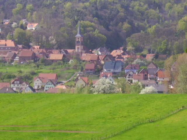 Une vue du village à partir d'un champ